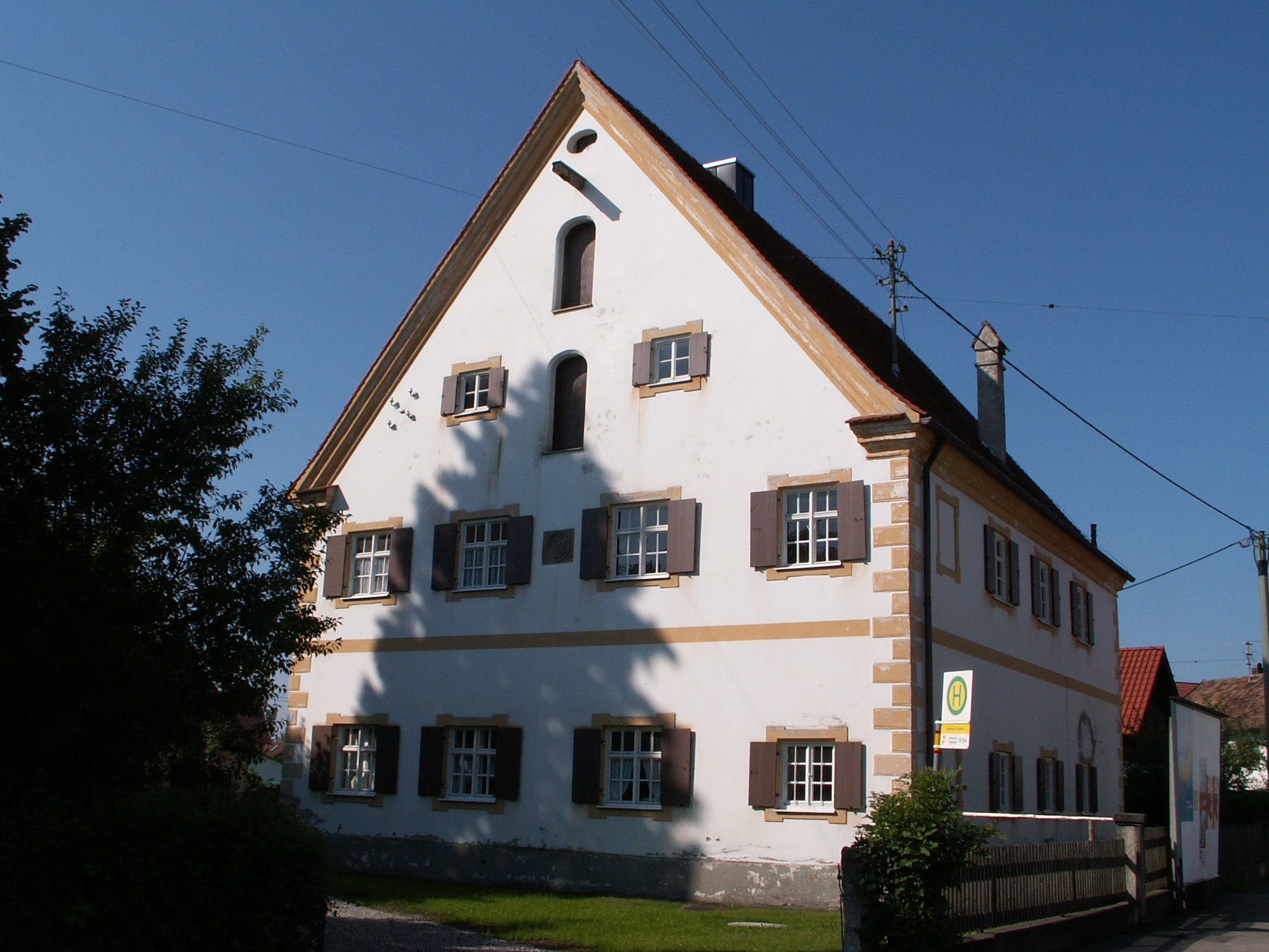 Pfarrhof in Siebnach, Ettringen